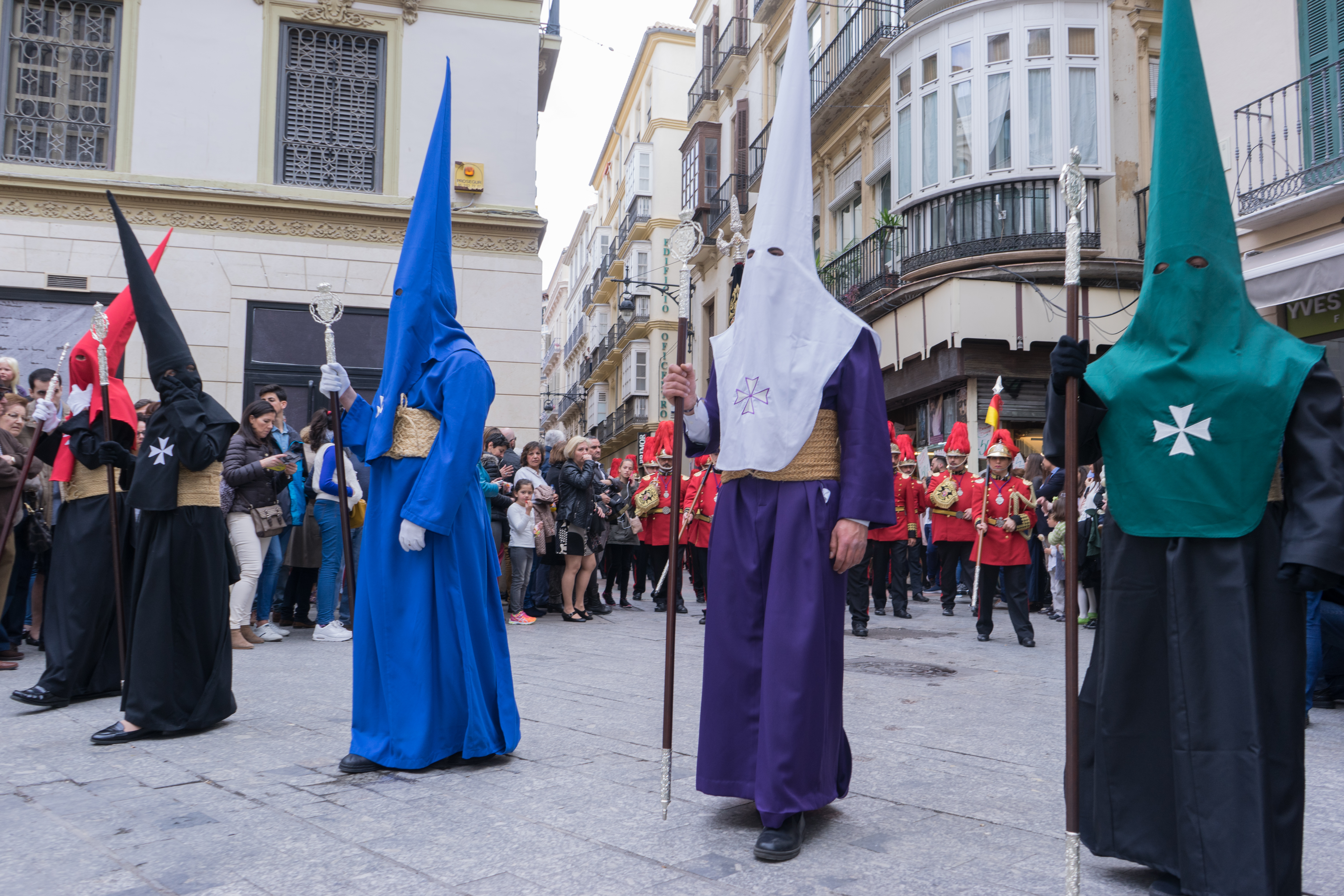 Representación de las Hermandades Fusionadas en la procesión de la Hermandad de Lágrimas y Favores (Fusionadas) This is a photography of a Folklore festival in Spain (Wikidata id Q9075883).